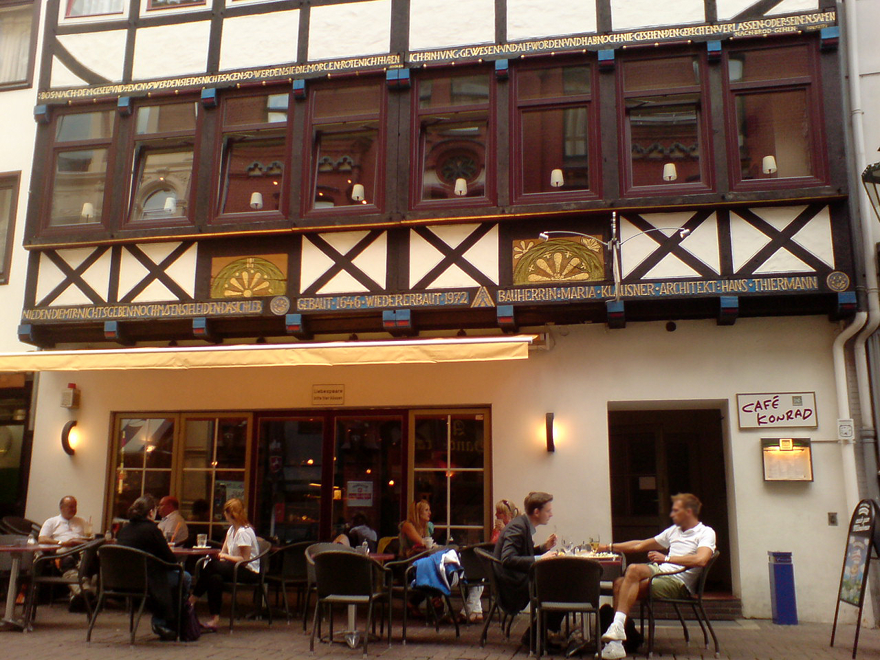 Impressionen von Café Konrad, Knochenhauerstraße 34 in der Altstadt von Hannover (nur Handy-Fotos mit 3 MB) ...